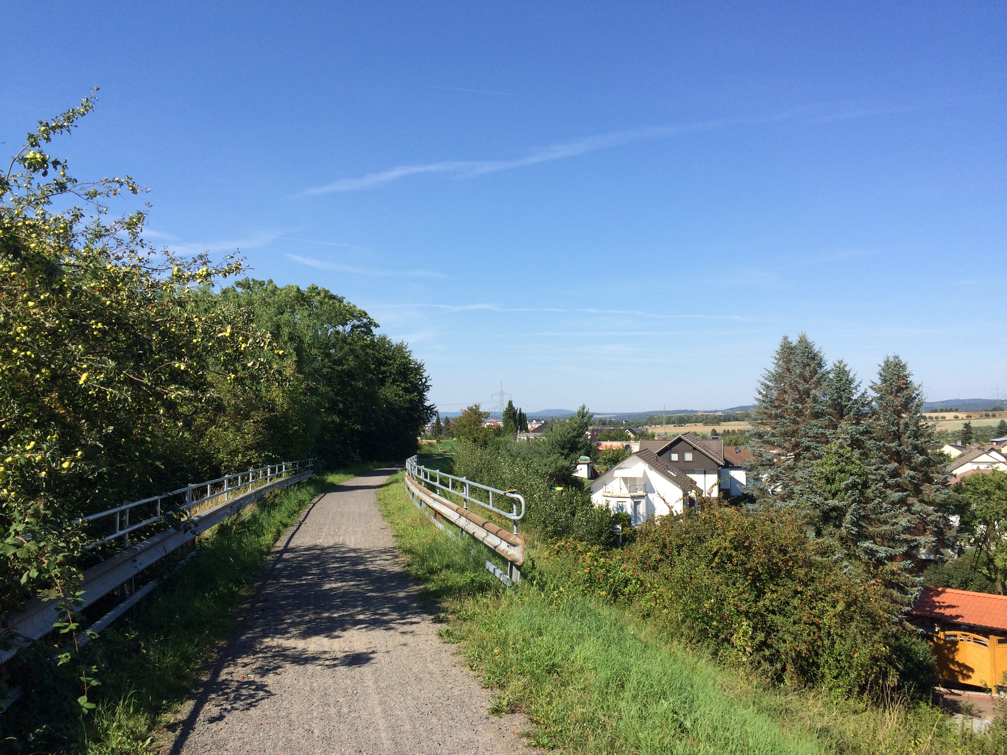 Ehemalige Bahntrasse der Söhrebahn zwischen Riedweg und Vollmarshäuser Straße